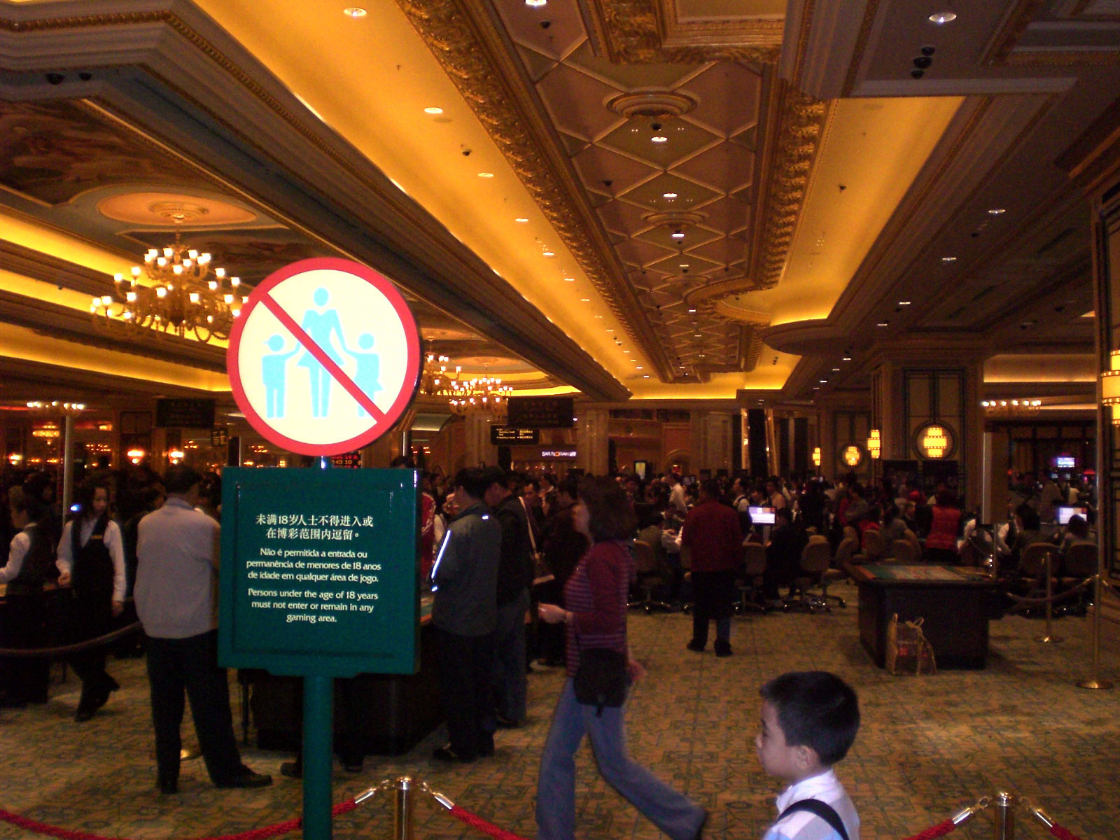 澳門威尼斯人渡假村酒店賭場